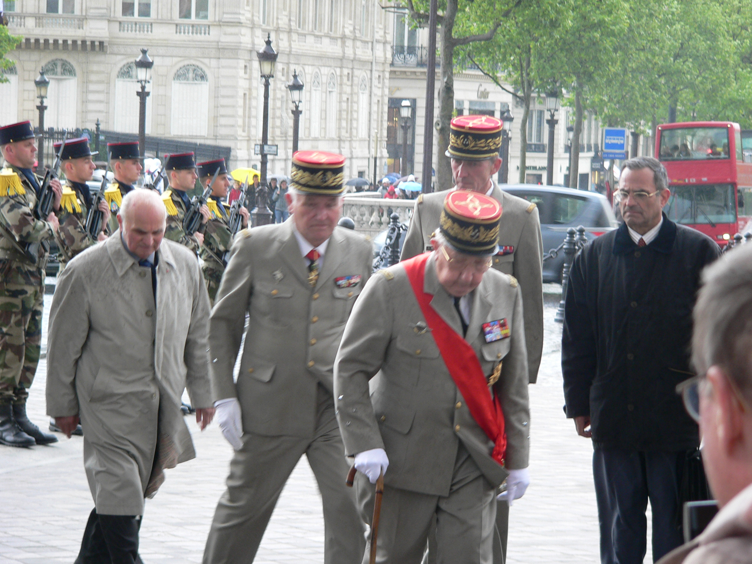 Le général Combette (écharpe rouge de la Grand Croix de la Légion d'Honneur) entouré d'officiels lors d'un ravivage de la "Flamme sous l'Arc de Triomphe - Flamme de la Nation" en avril 2009.